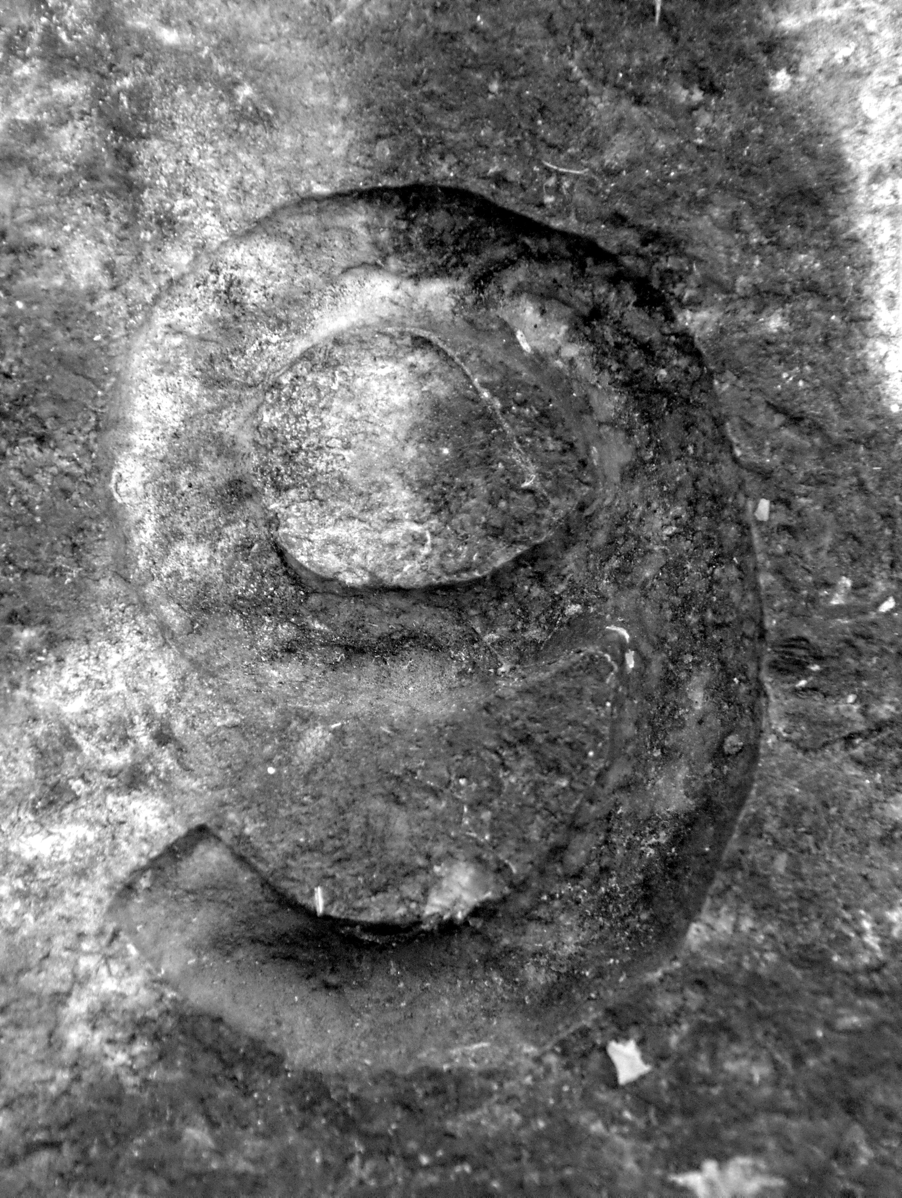 9 (Elkridge, MD)